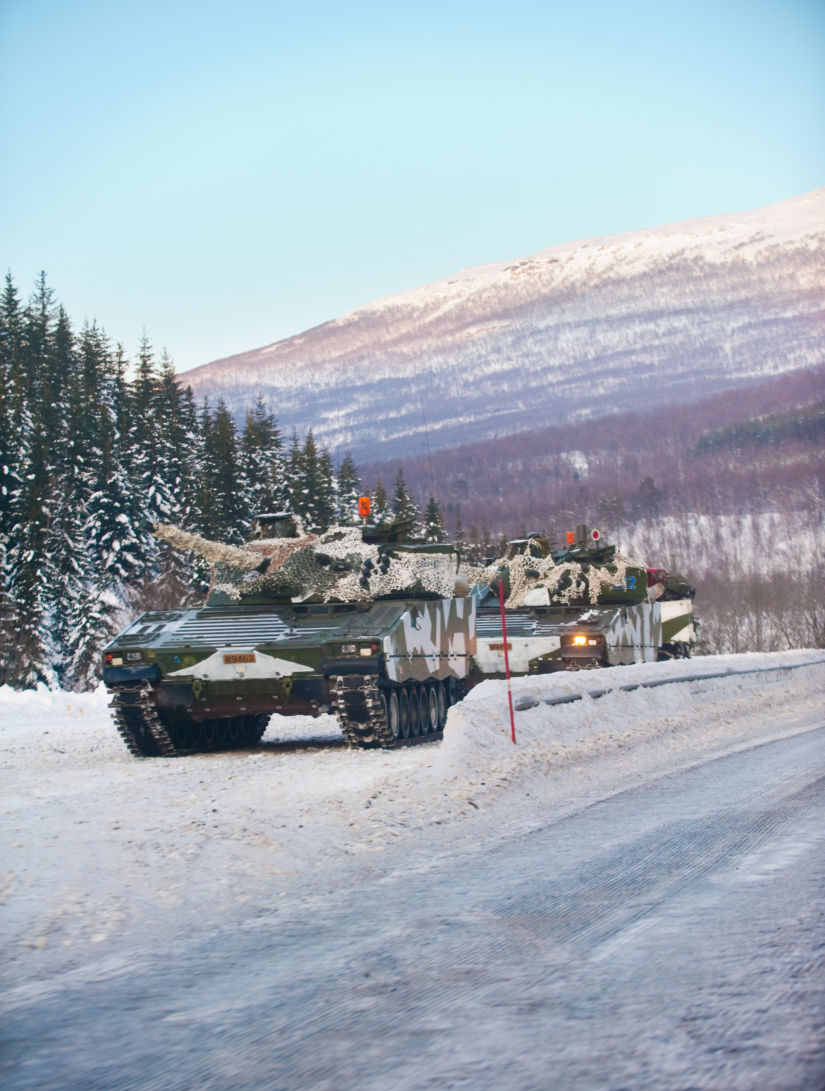 Norske CV90-stormpanservogner står klare til å rykke fremover langs E6.